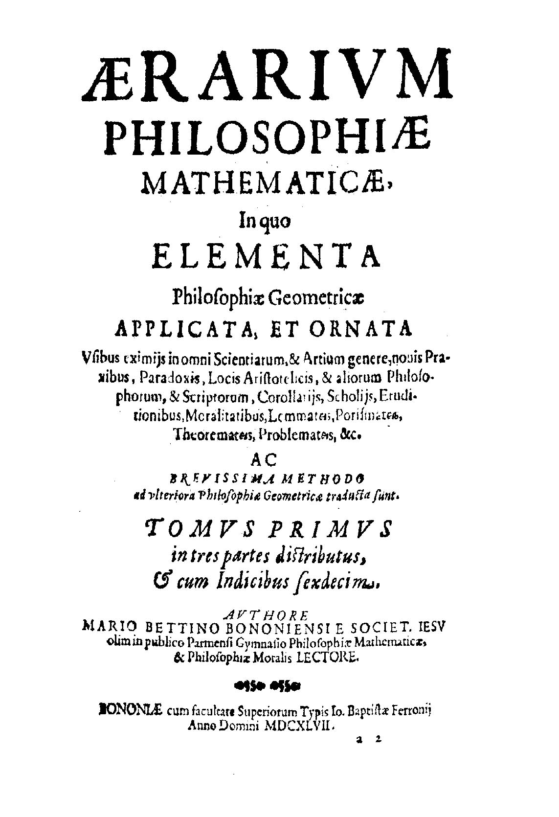 Aerarium philosophiae mathematicae, in quo elementa philosophiae geometricae applicata, et ornata ... methodo ad ulteriora philosophiae geometricae traducta sunt ... Authore Mario Bettino. tomus primus cum sexdecim indicibus. - Bononiae : typis Io. Baptistae Ferronij, 1647. - [60], 701 [i.e. 695], [1] p. : ill., ritr. calcogr. .